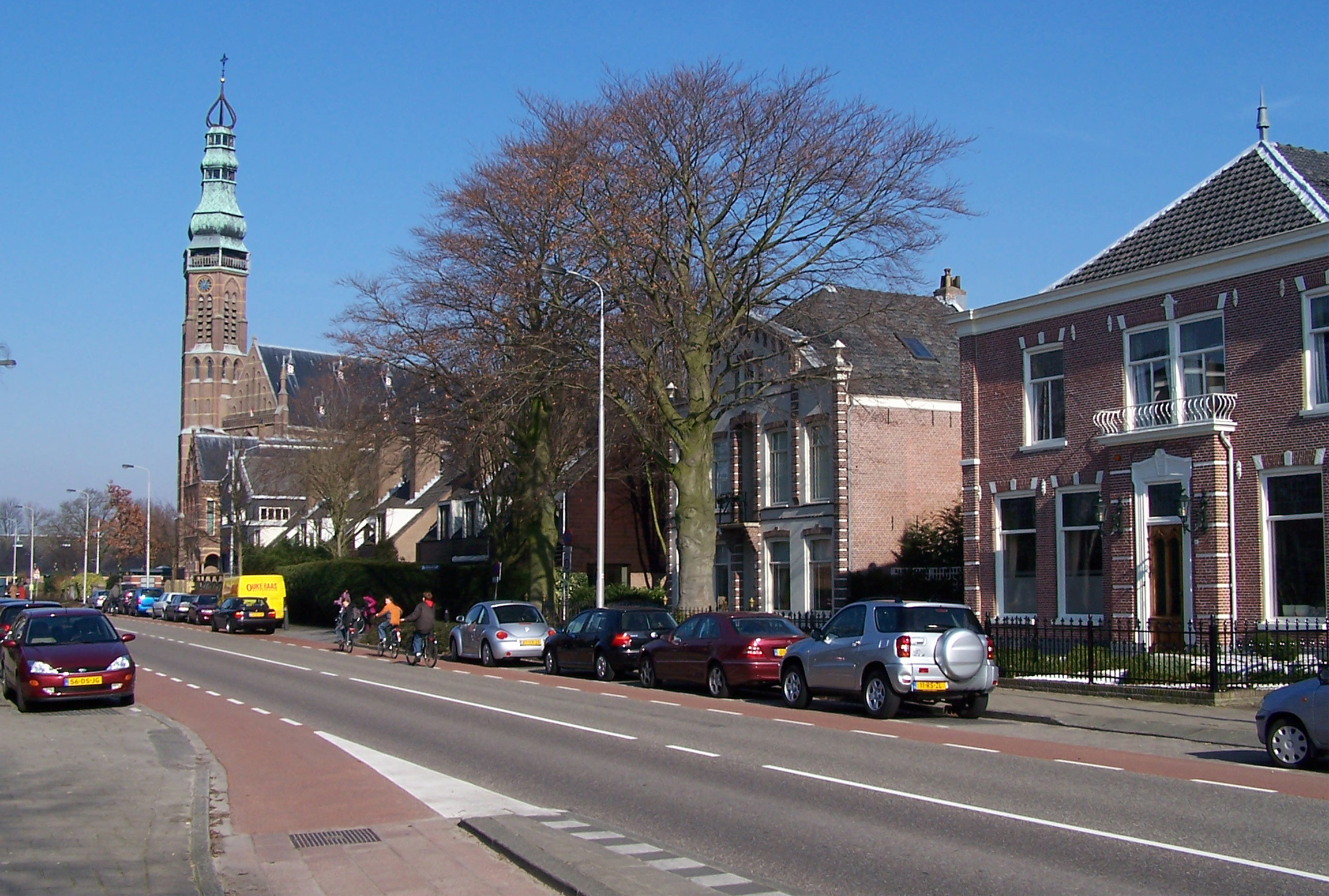 Heereweg in Lisse, the Netherlands.